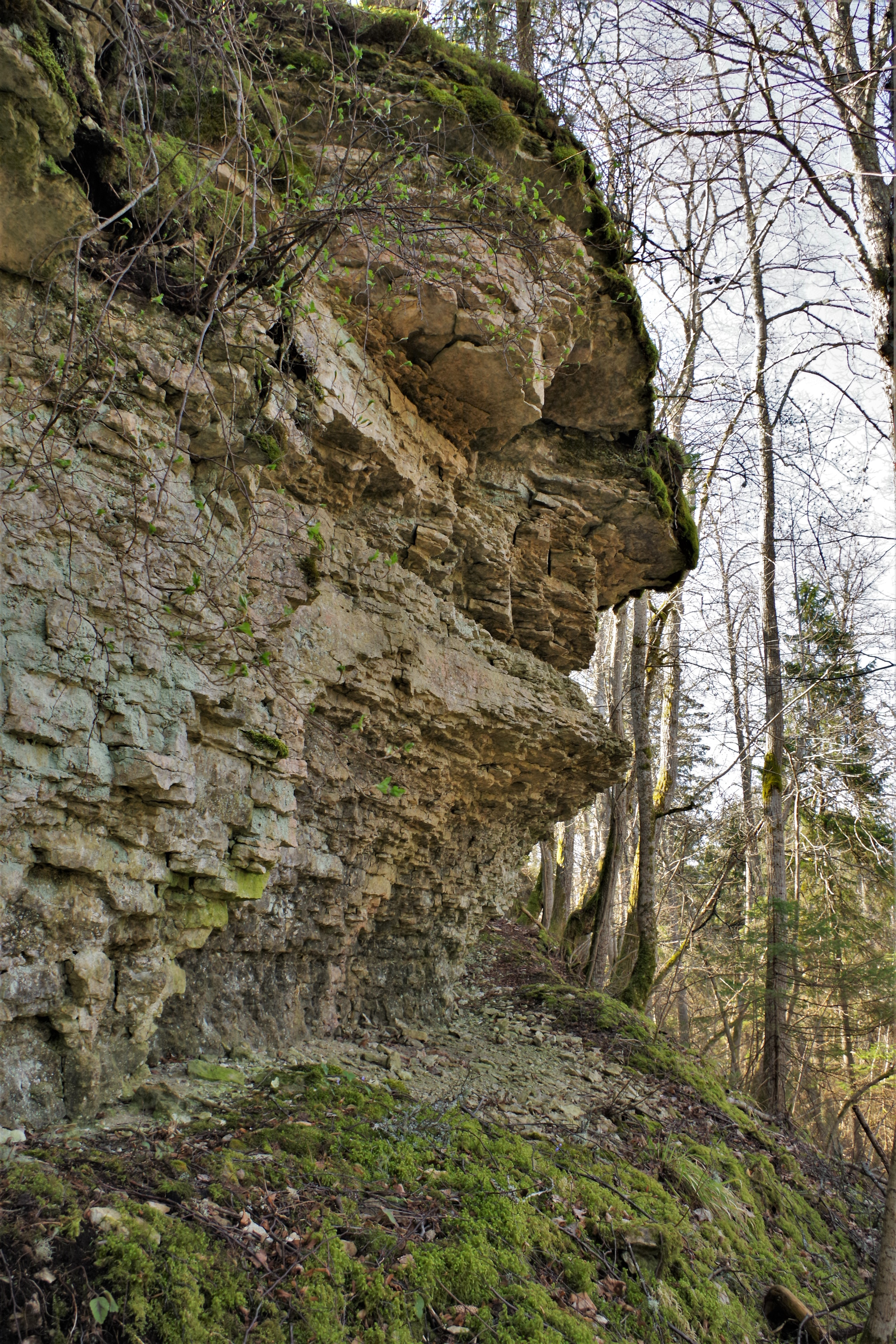 Ubari pank on osa Põhja-Eesti klindist ja asub Ubari maastikukaitsealal.